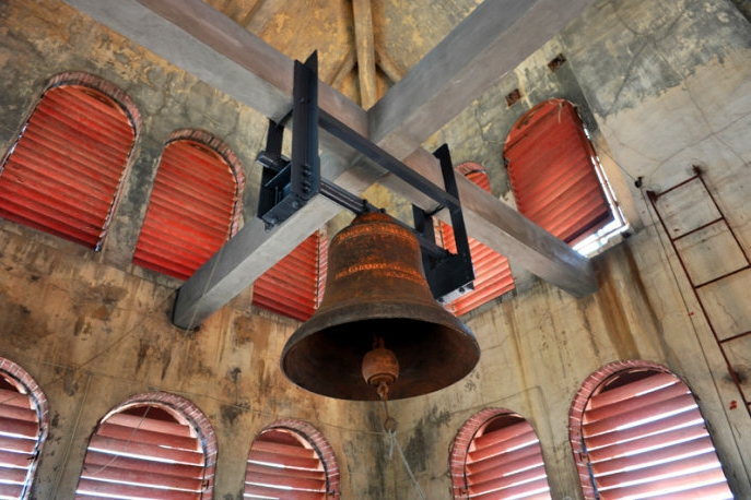 青岛圣保罗教堂大钟